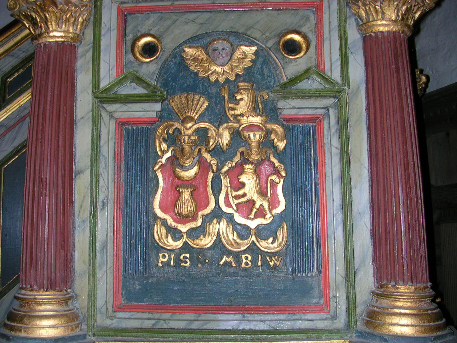 Slektsmerke for Baden ("Jernskjegg") og Breide på prekestolen i Hedrum kirke